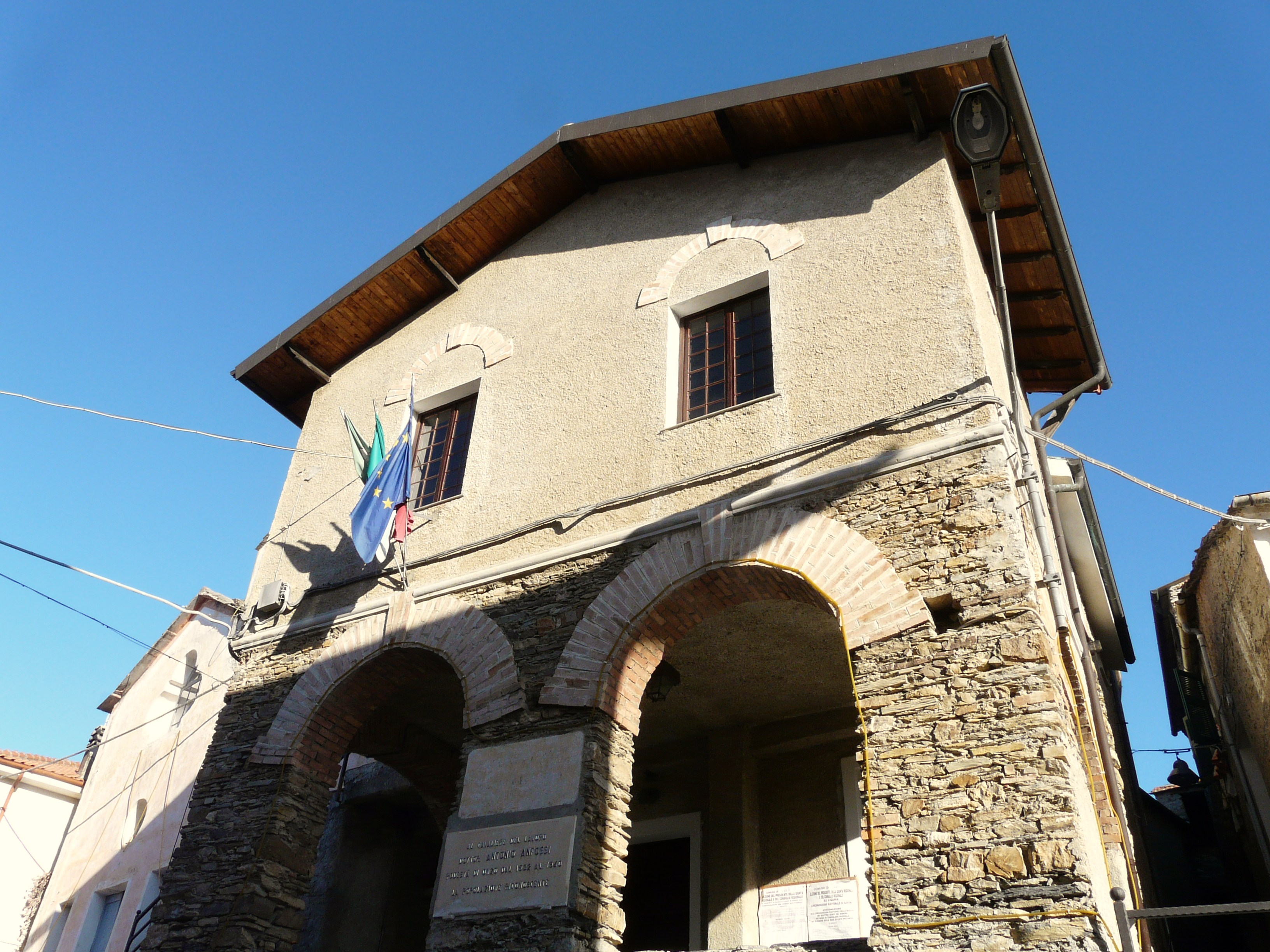 Municipio di Onzo, Liguria, Italia